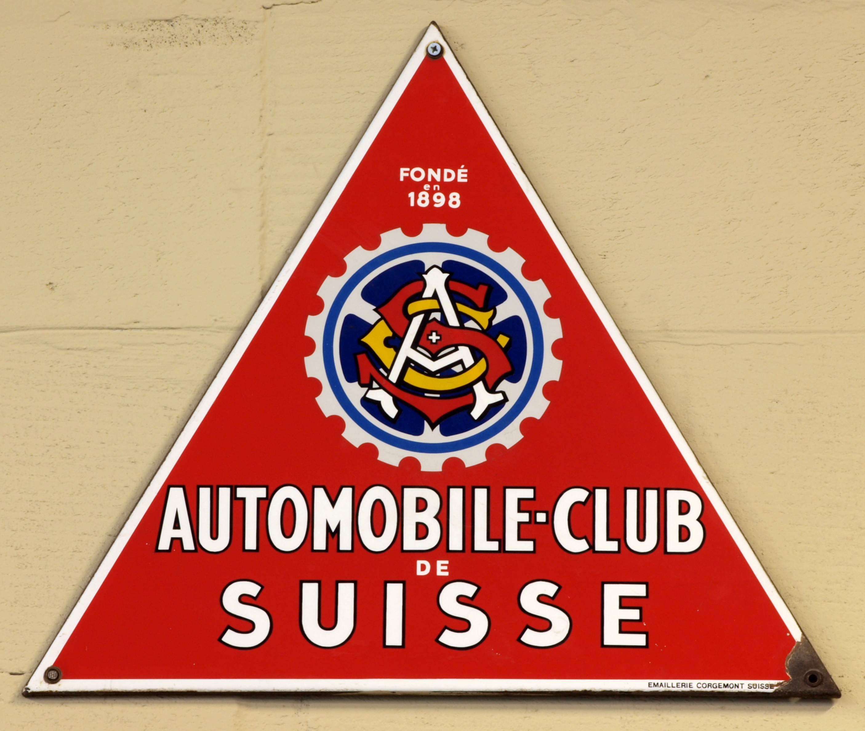 Den Hartogh Ford Museum. Automobile-Club de Suisse, enamel advert sign at the den hartog ford museum